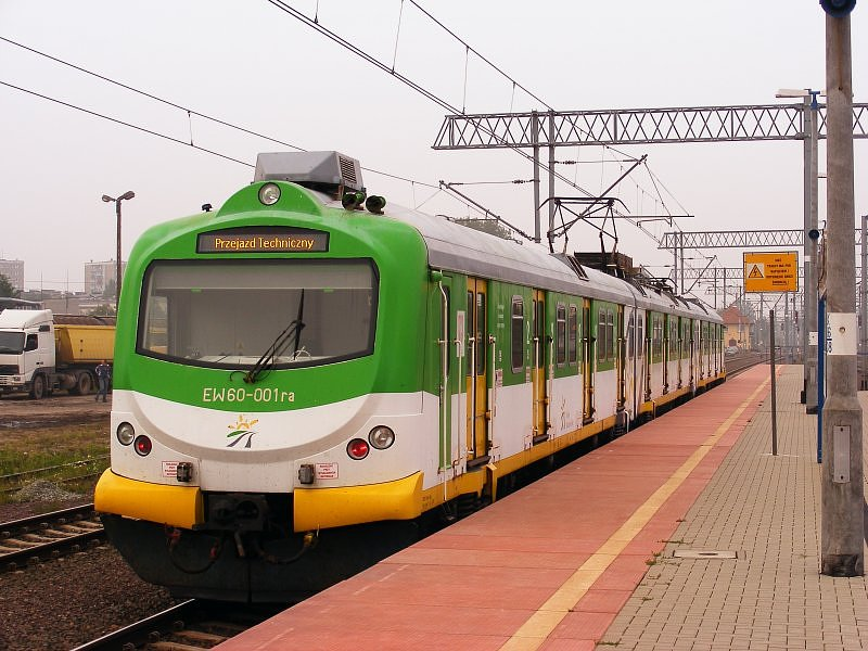 Elektryczny zespół trakcyjny EW60-001 podczas przejazdu technicznego na stacji Poznań Wschód.